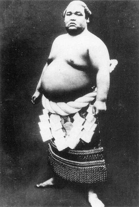 20th Yokozuna, Umegatani Totaro Ⅱ（第20代横綱 2代目梅ヶ谷藤太郎）